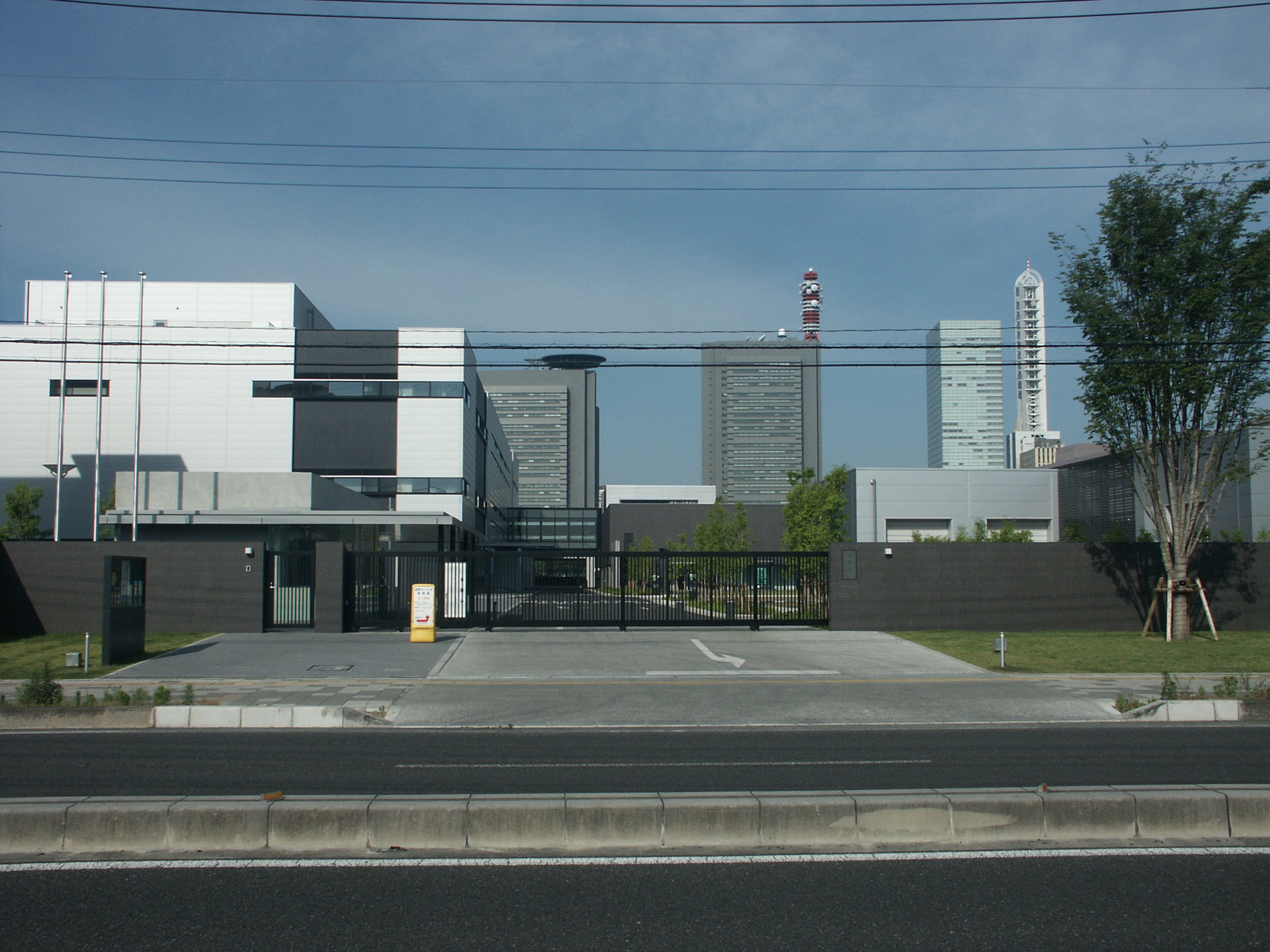 造幣局さいたま支局庁舎